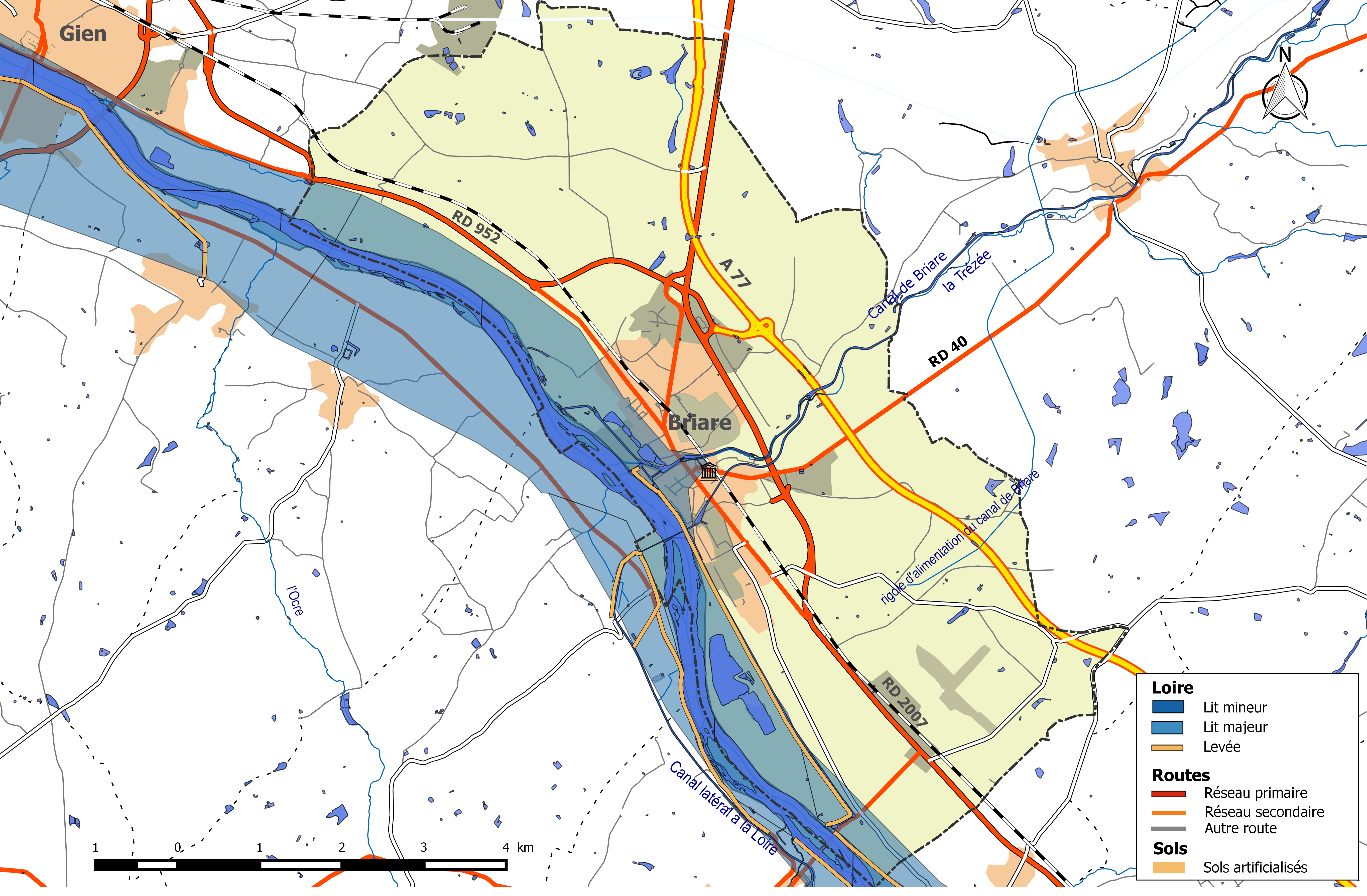 Zone inondable et réseaux hydrographique et routier de la commune de Briare